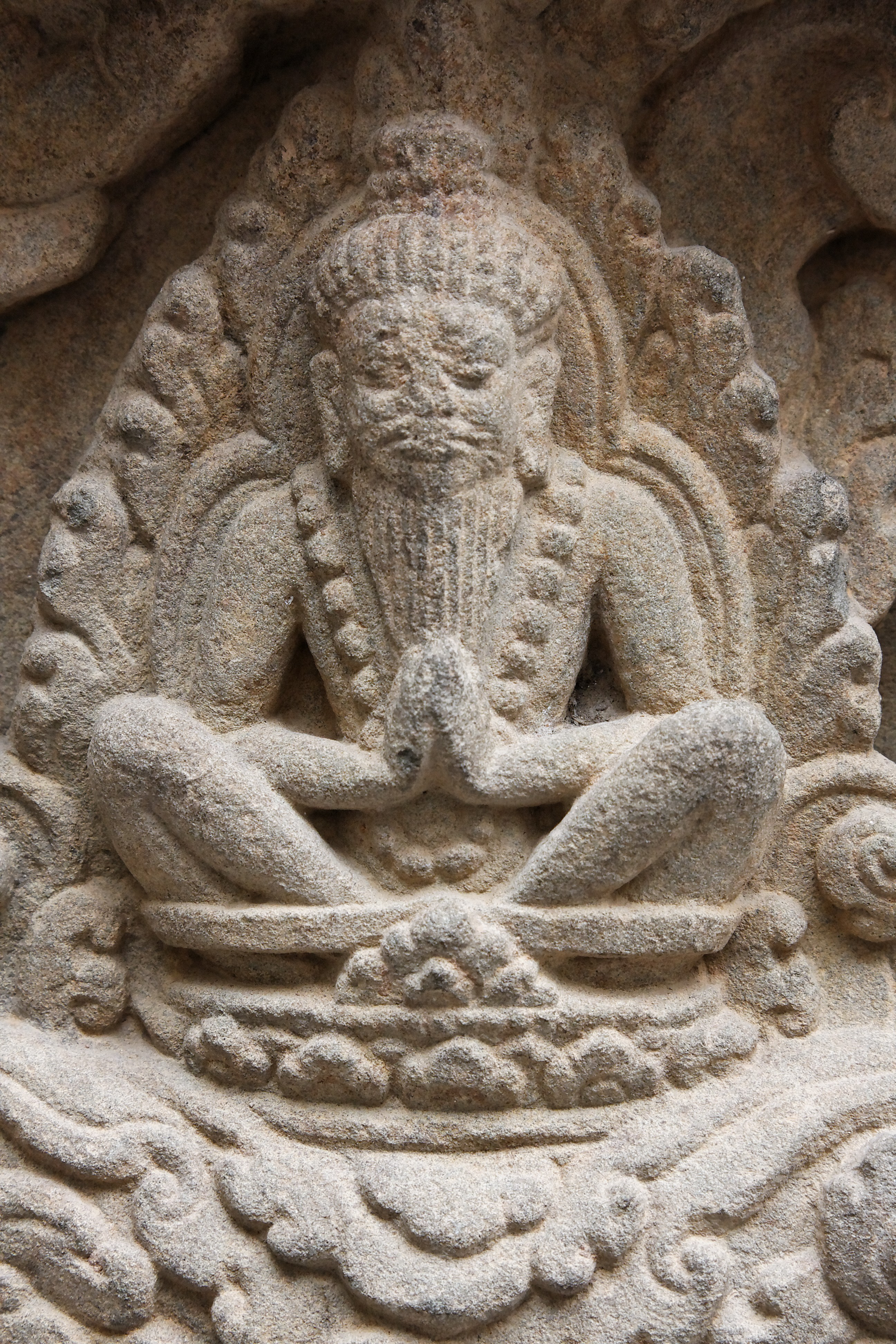 Rishi: détail d'un linteau, Cambodge, Kapilapura (Angkor), style de Preah Ko, dernier quart du IXème siècle, grès.